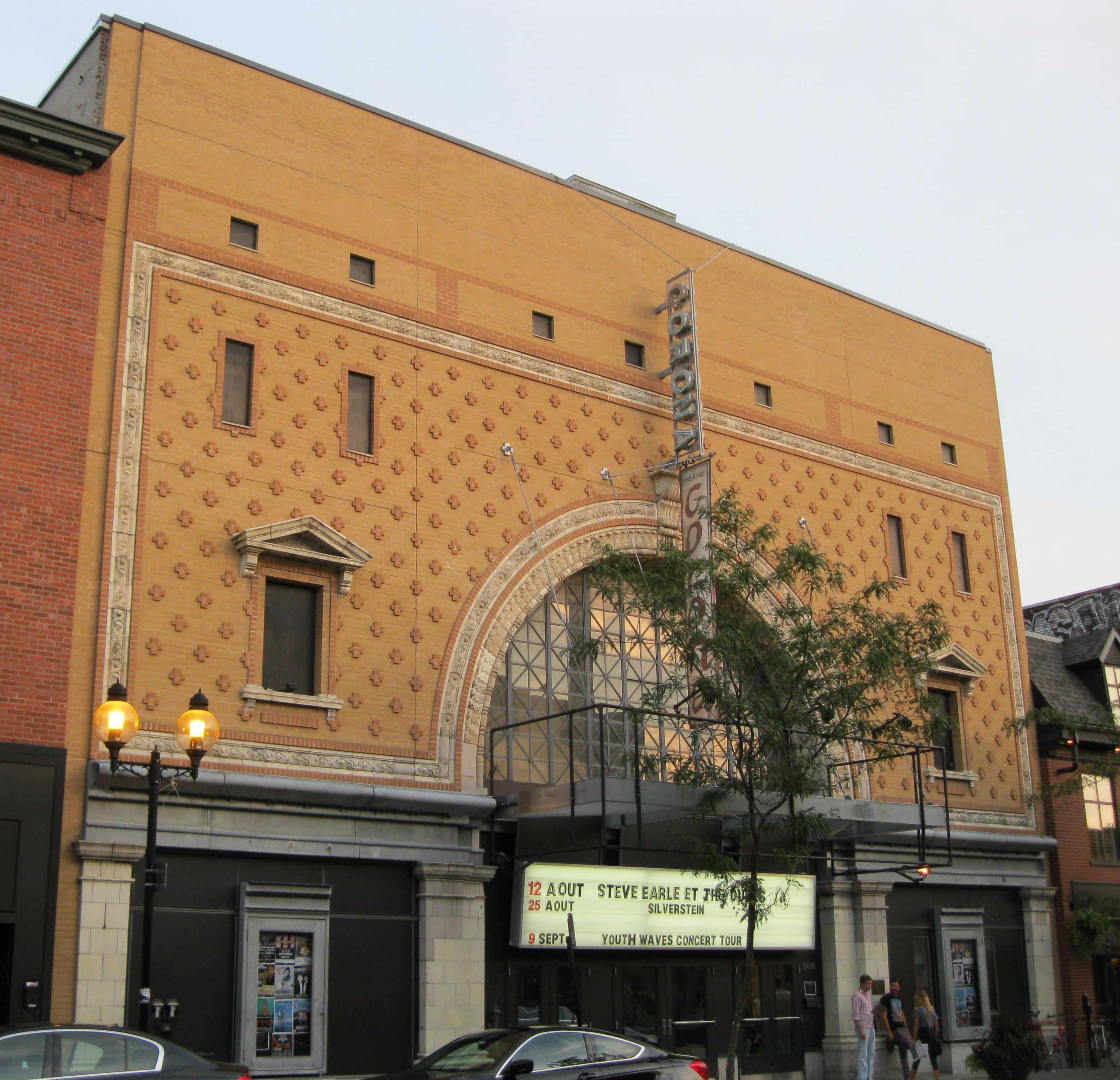 Le Théâtre Corona est situé au 2490 rue Notre-Dame ouest à Montréal.